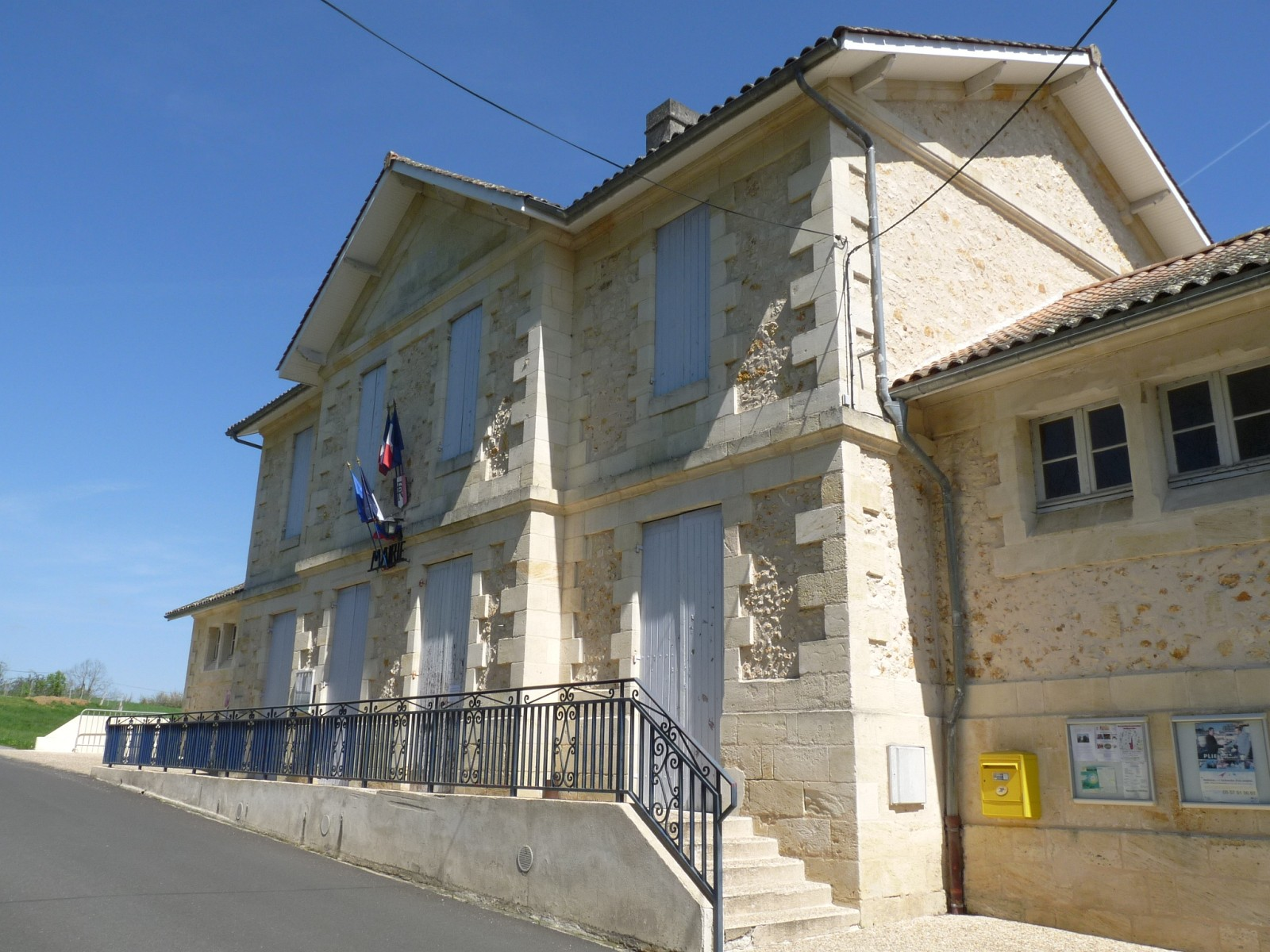 Mairie de Chamadelle, Gironde, France